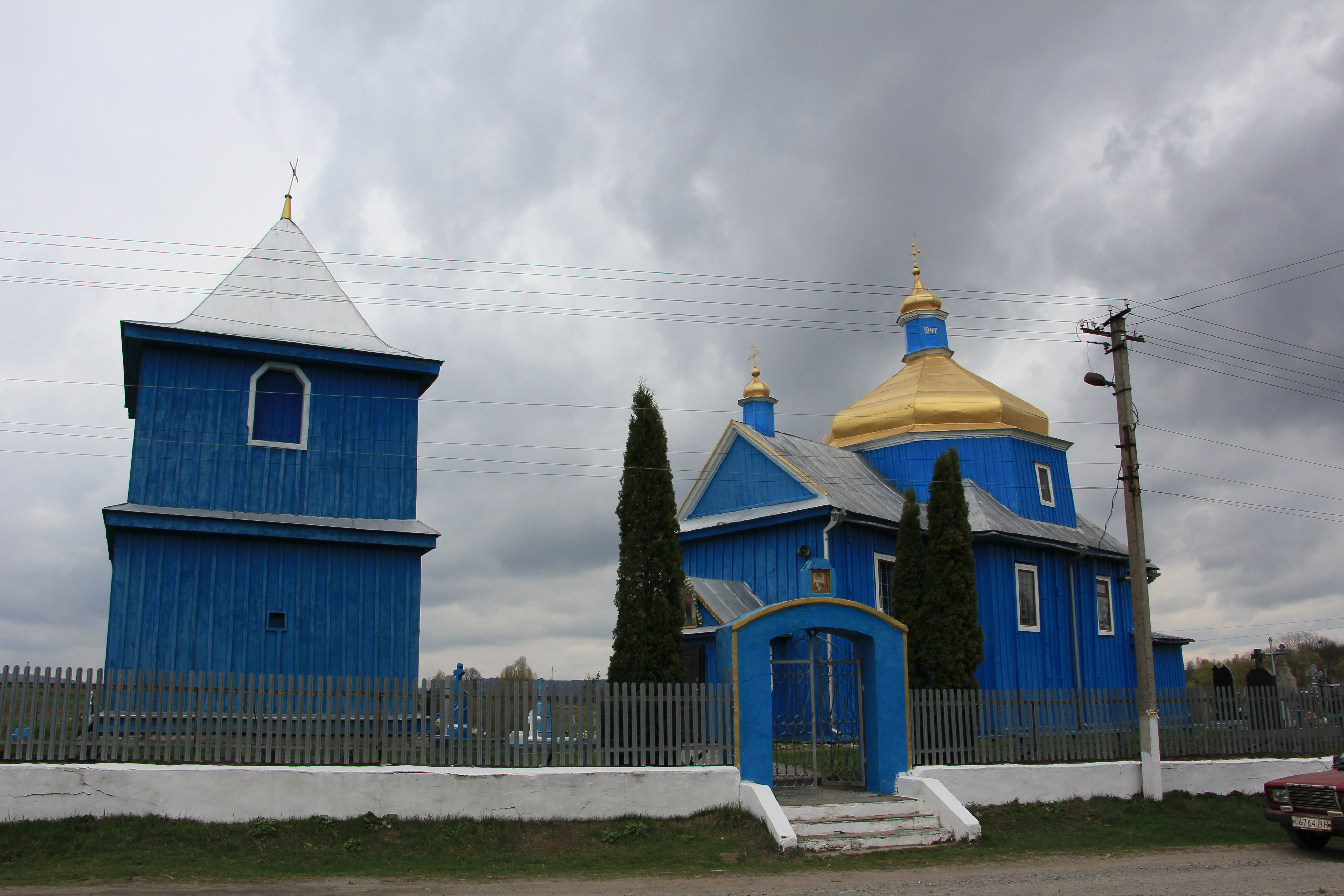 Дерев'яна церква в селі Рудки Кременецького району Тернопільської області